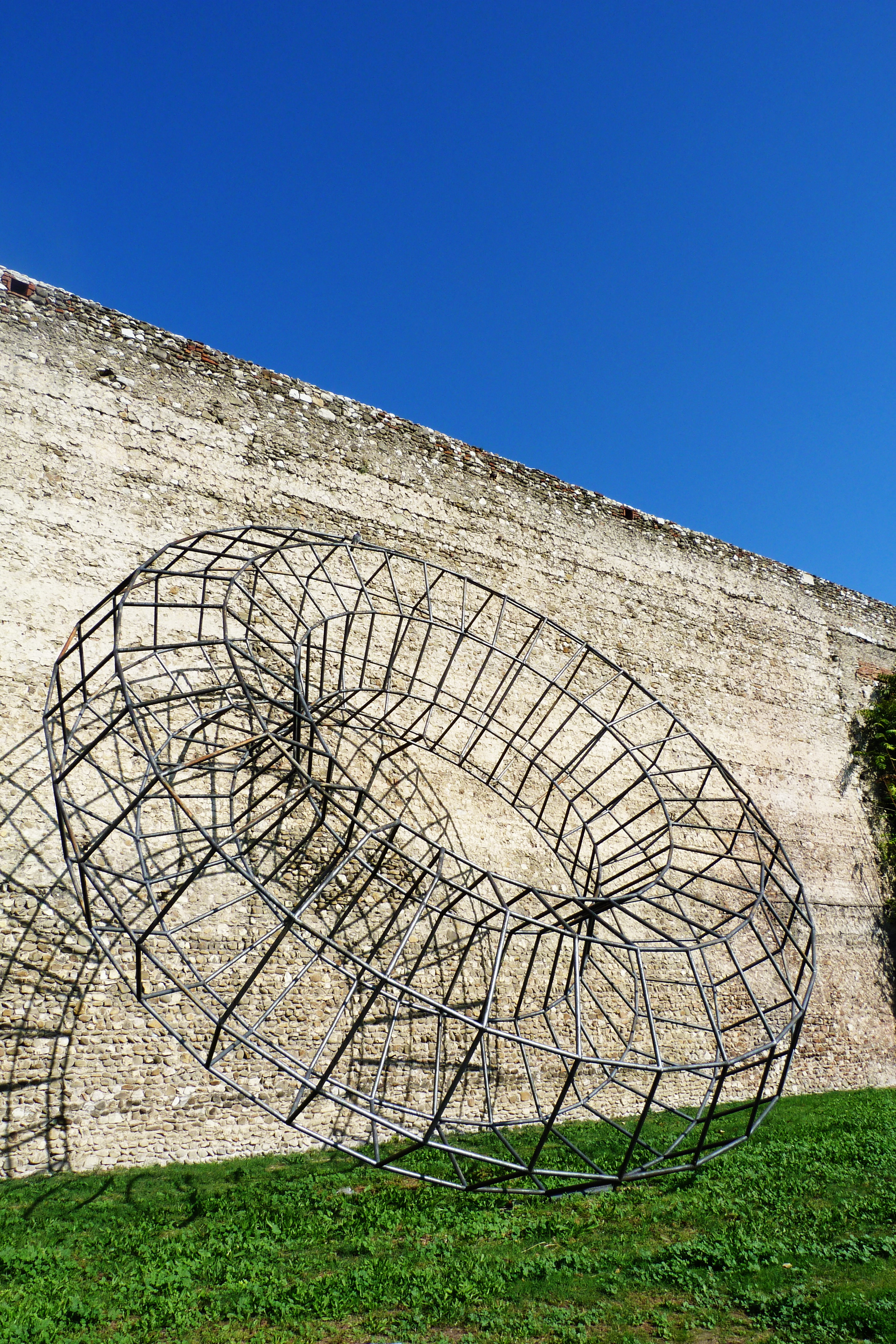 Antiche mura di Prato con scultura moderna, Toscana, Italia This is a photo of a monument which is part of cultural heritage of Italy.